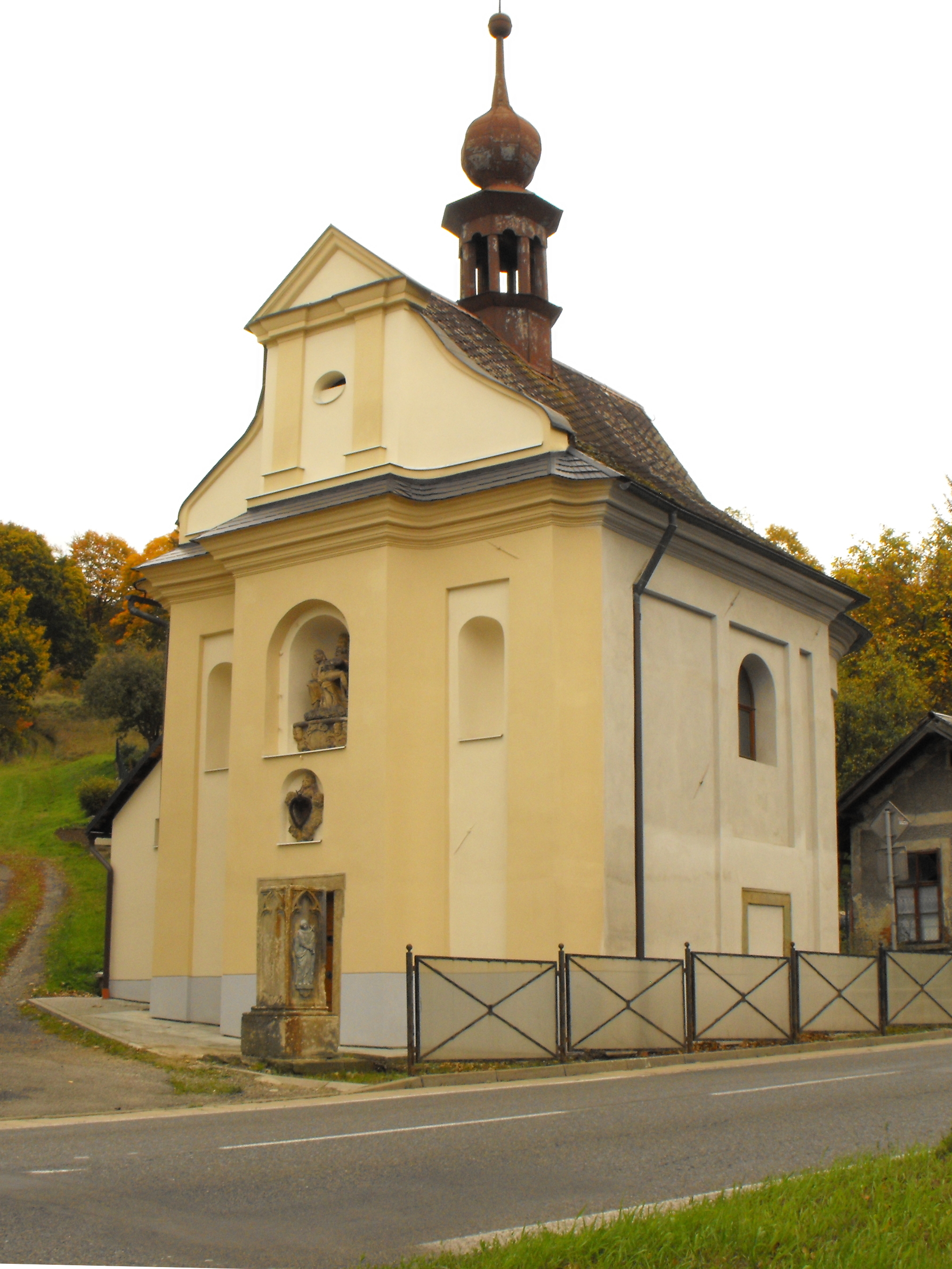 Kaple Čtrnácti sv. pomocníků (Březová nad Svitavou), J okraj obce, při hl. silniční komunikaci, Březová nad Svitavou